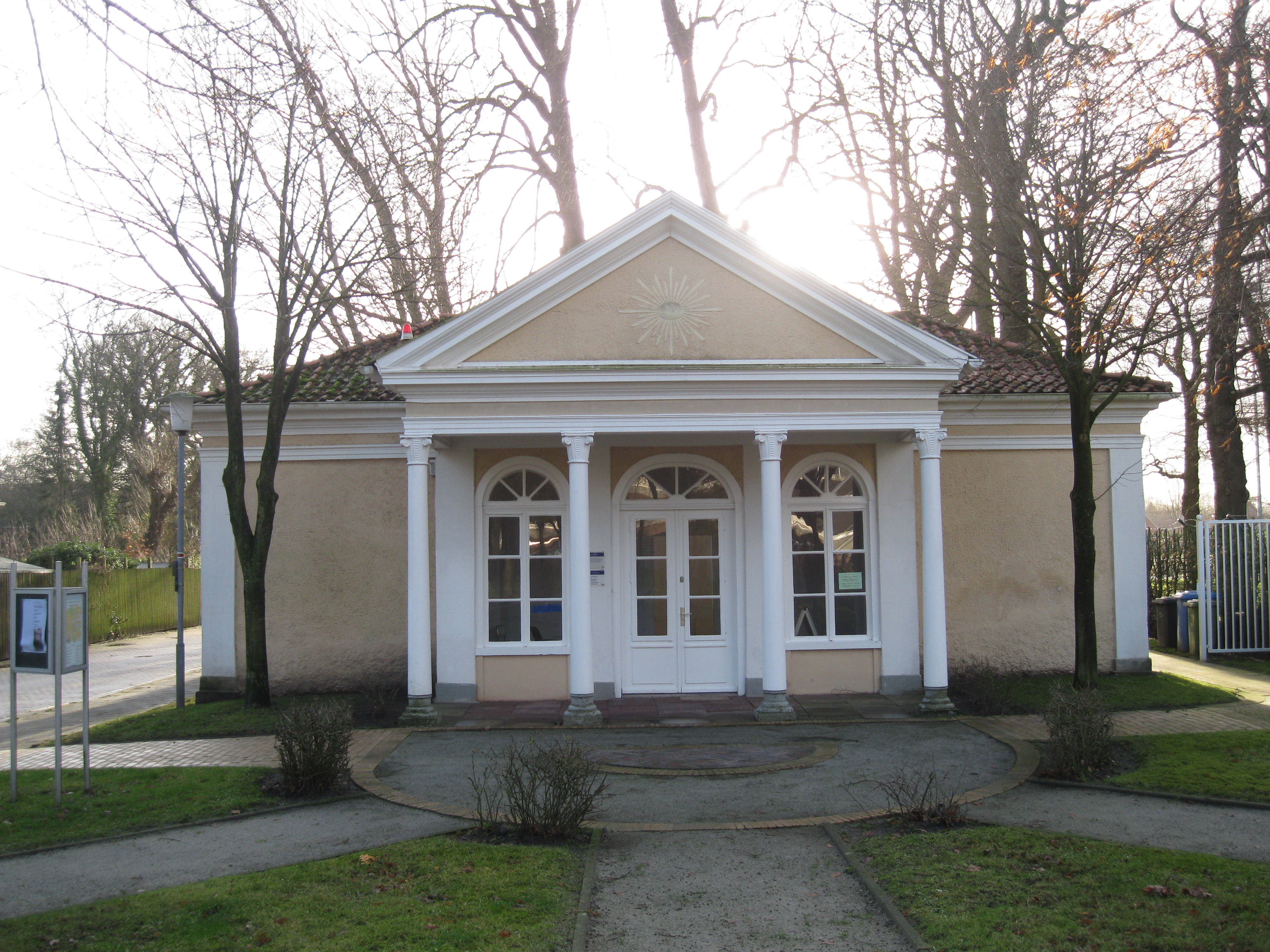 Das Gebäude wurde um 1803 als Teehaus für den Landschaftssekretär Christian Bernhard Conring errichtet. Es wird seit 1992 von Kunstverein Aurich für Ausstellungen genutzt, daher wird es heute meist als Kunstpavillion bezeichnet. Das Gebäude wurde von Conrad Bernhard Meyer entworfen.